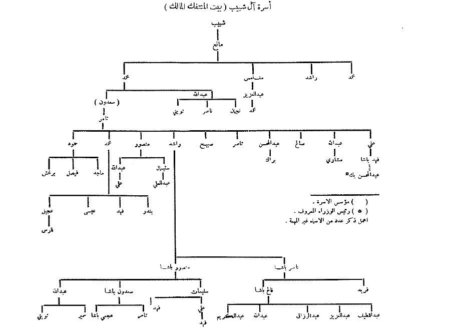 شجرة أسرة السعدون - أمراء المنتفق - كتاب أربعة قرون من تاريخ العراق الحديث ، صفحة : 420 ، الملحق الثاني ، المؤرخ الأنجليزي ستيفن هيمسلي لونكريك ، المفتش الأداري بالعراق مابعد الحرب العالمية الأولى.